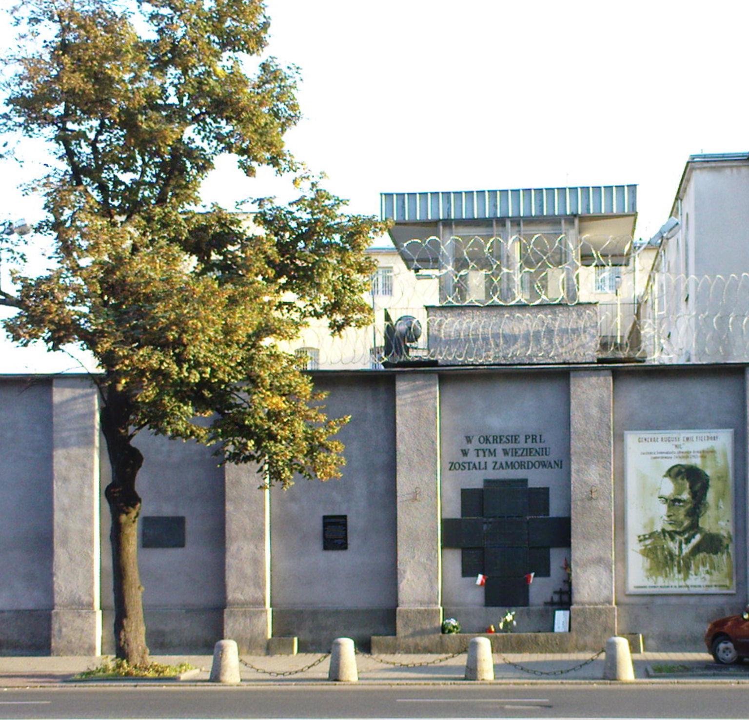 W hołdzie torturowanym i zamęczonym w okresie terroru komunistycznego - miejsce pamięci na murze mokotowskiego więzienia w Warszawie.